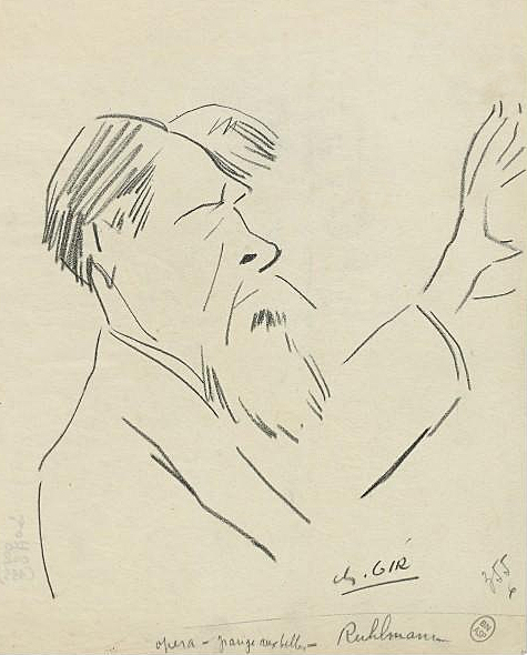 François Ruhlmann : caricature